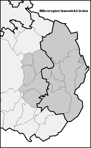 Mikroregion Ivanovická brána (Vyškov- Czech republic)